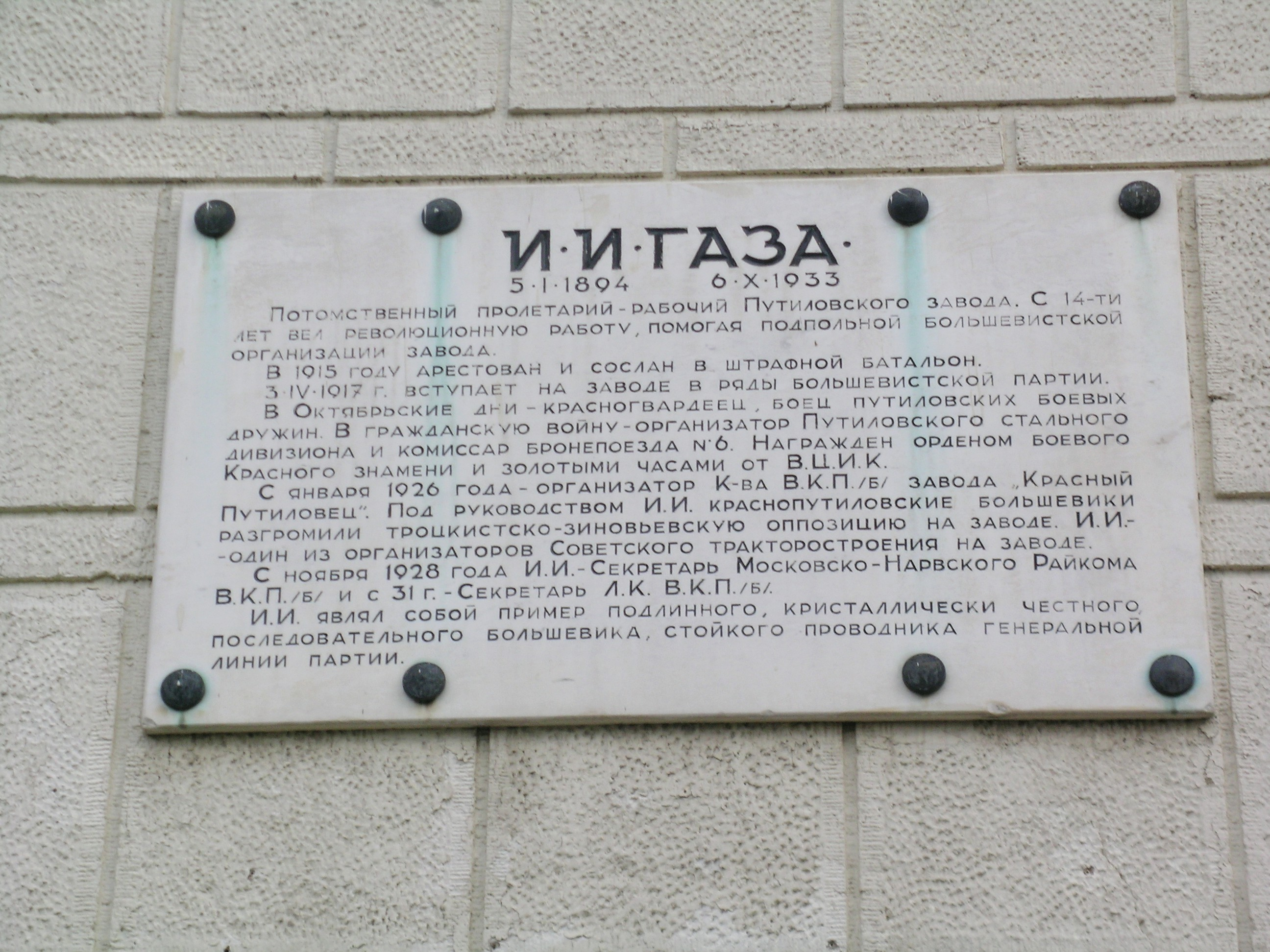 Доска на ДК Газа. «И. И. Газа. 5.1.1894–6.Х.1933. Потомственный пролетарий-рабочий Путиловского завода. С 14-ти лет вёл революционную работу, помогая подпольной большевистской организации завода. В 1915 году арестован и сослан в штрафной батальон. 3.IV.1917 г. вступает на заводе в ряды большевистской партии. В Октябрьские дни — красногвардеец, боец путиловских боевых дружин. В Гражданскую войну — организатор Путиловского стального дивизиона и комиссар бронепоезда № 6. Награждён орденом боевого Красного знамени и золотыми часами от В.Ц.И.К. С января 1926 — года организатор К-ва В.К.П.(б) завода «Красный Путиловец». Под руководством И. И. Газа краснопутиловские большевики разгромили троцкистско-зиновьевскую оппозицию на заводе. И. И. — один из организаторов советского тракторостроения на заводе. С ноября 1928 года И. И. — секретарь Московско-Нарвского Райкома В.К.П.(б) и с 31 г. — секретарь Л.К. В.К.П.(б). И. И. являл собой пример подлинного, кристаллически честного, последовательного большевика, стойкого проводника генеральной линии партии». [1] 1957 год. Архитектор: Егоров М. Ф., материал — мрамор.